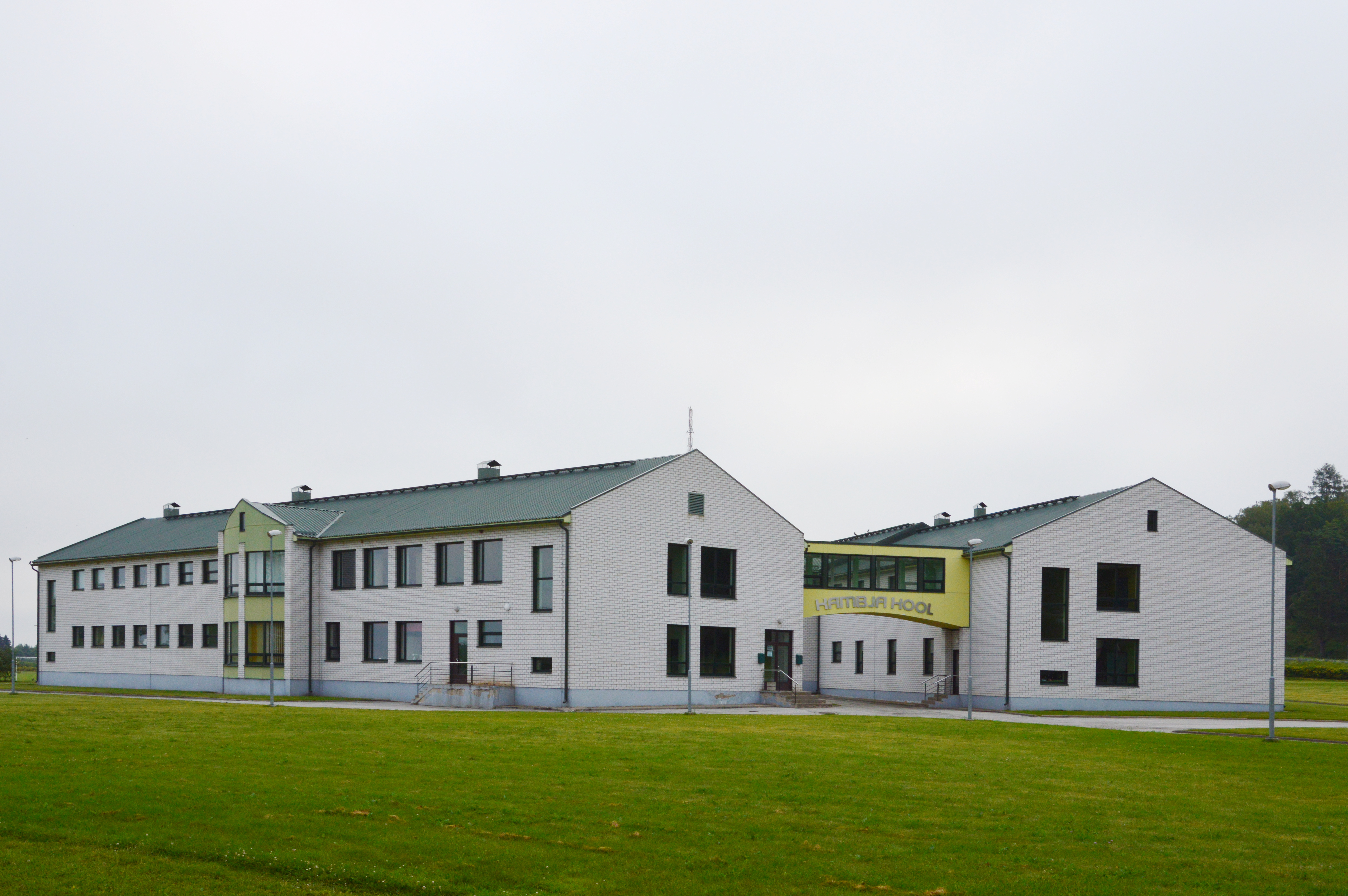 Kambja kool